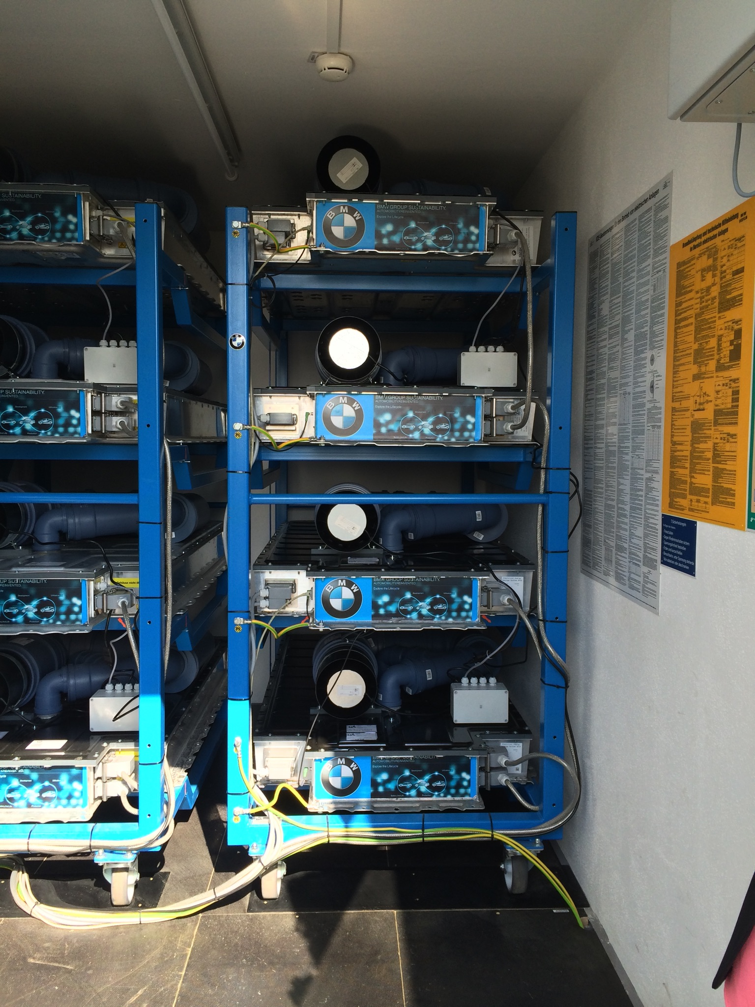 Racks mit gebrauchten BMW i3 Batterien dienen als Pufferspeicher für Windenergie